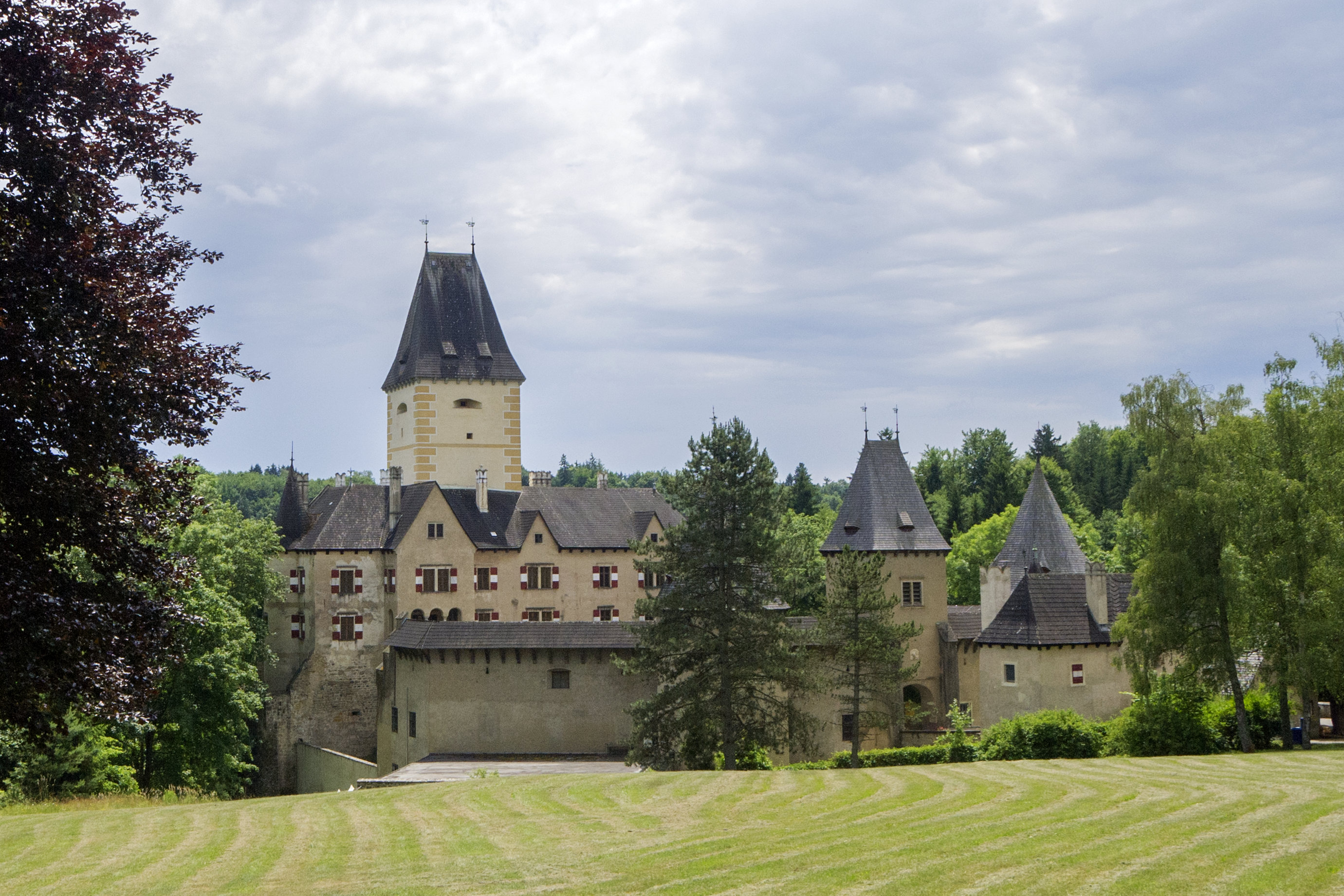 Burganlage Ottenstein